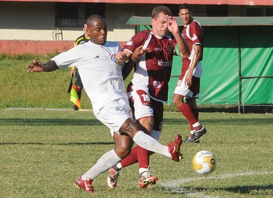 Campeonato Capixaba 2010: Veja as imagens de Desportiva x Espírito Santo migre.me/D94C Foto: Bernardo Coutinho/A Gazeta